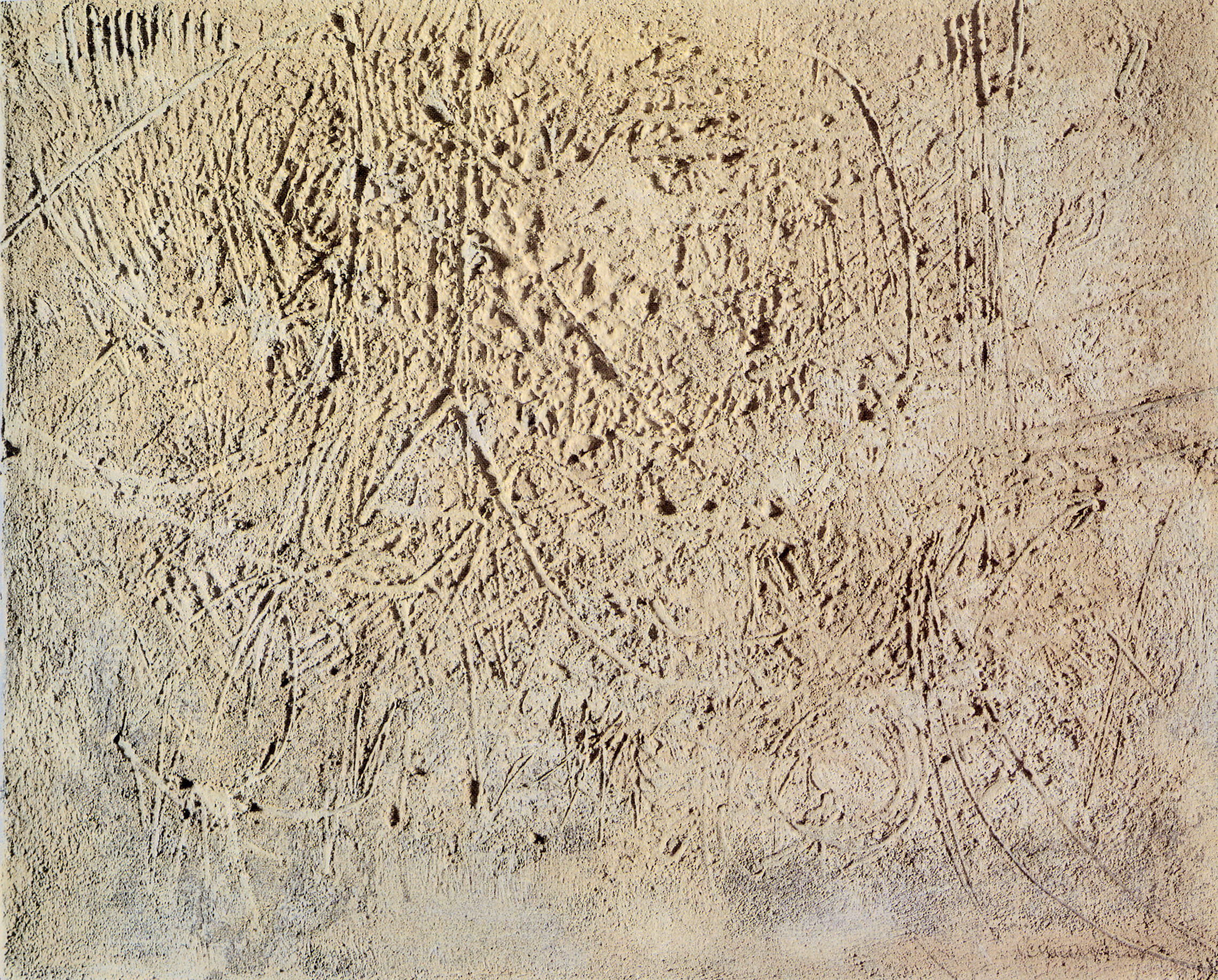 Il Muro